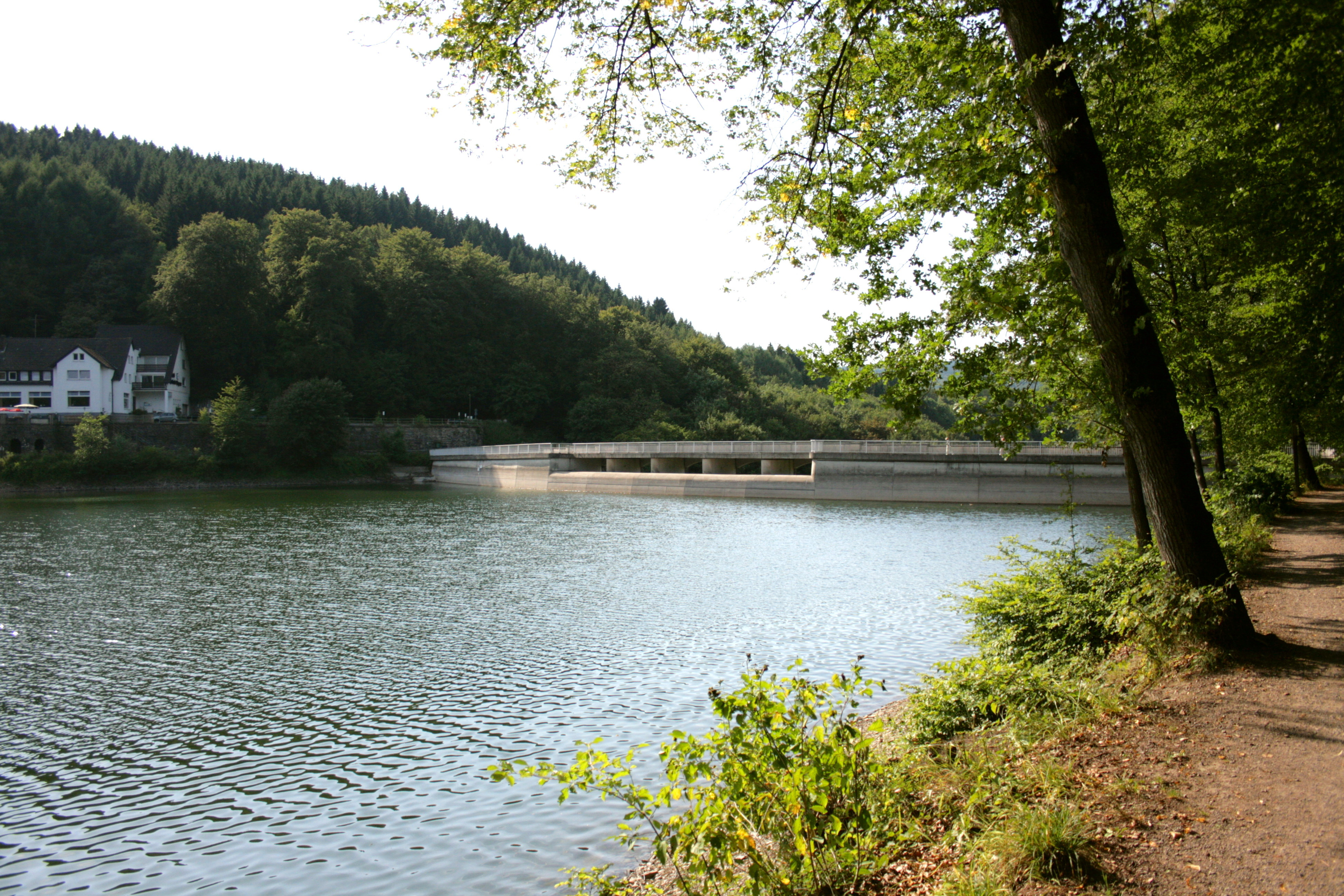 Fuelbecketalsperre in Altena